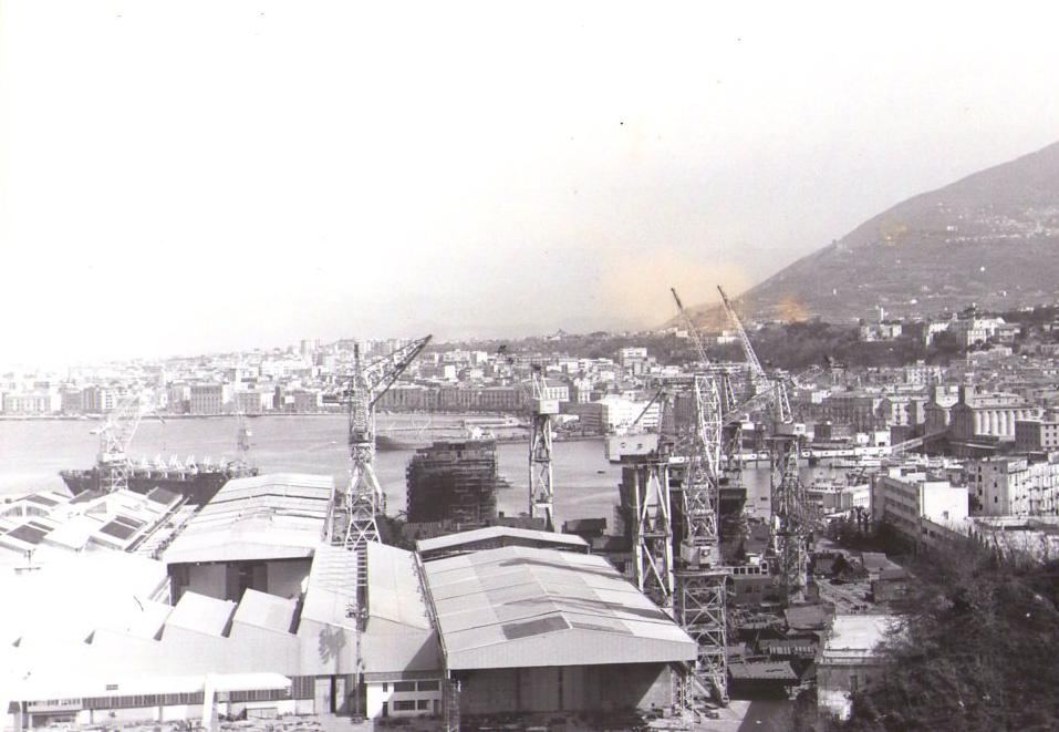 I cantieri navali di Castellammare di Stabia alla fine degli anni '60